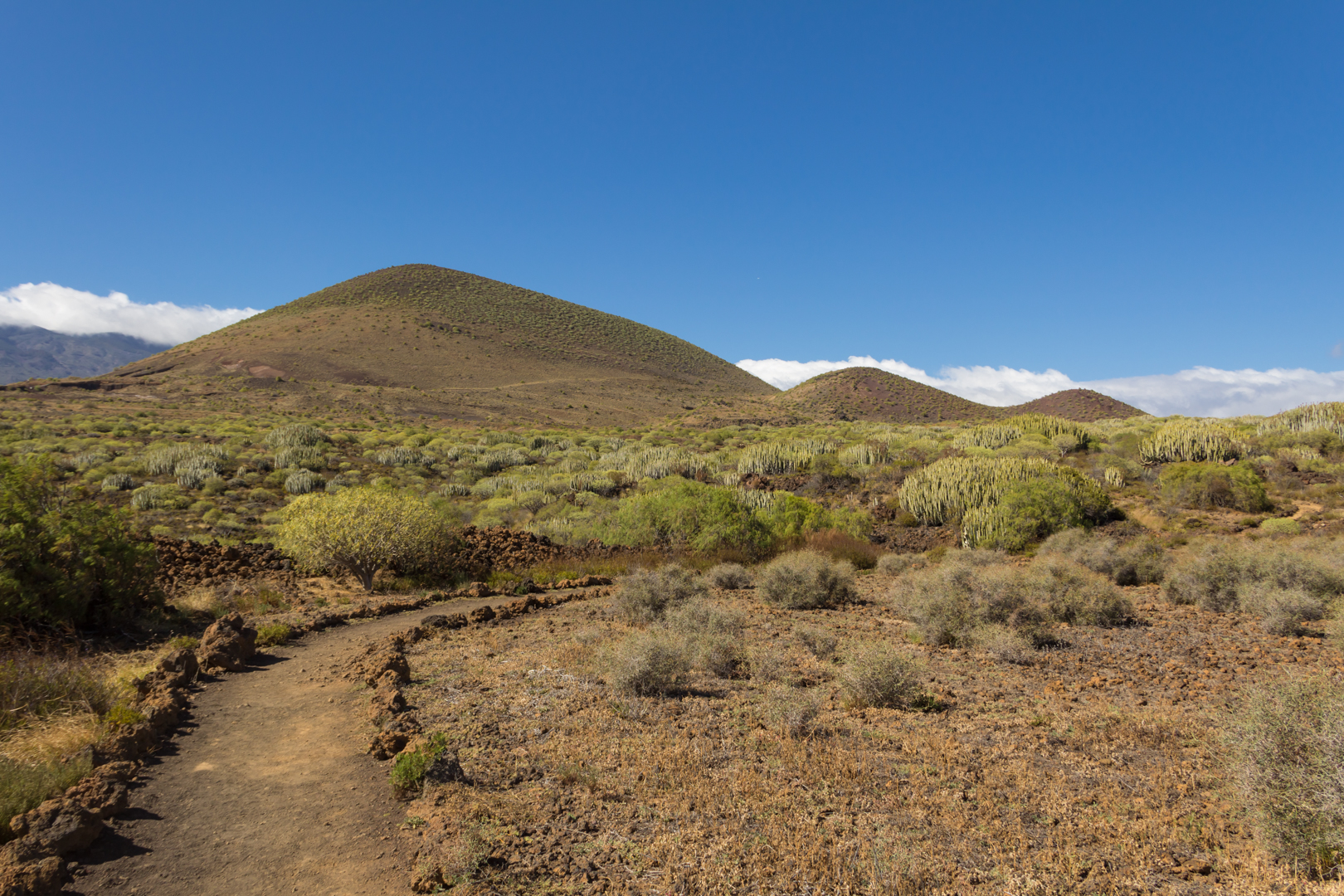 Malpaís de Güímar This is a photography of a Site of Community Importance in Spain with the ID: ES7020048. Natura2000 entry, EEA entry